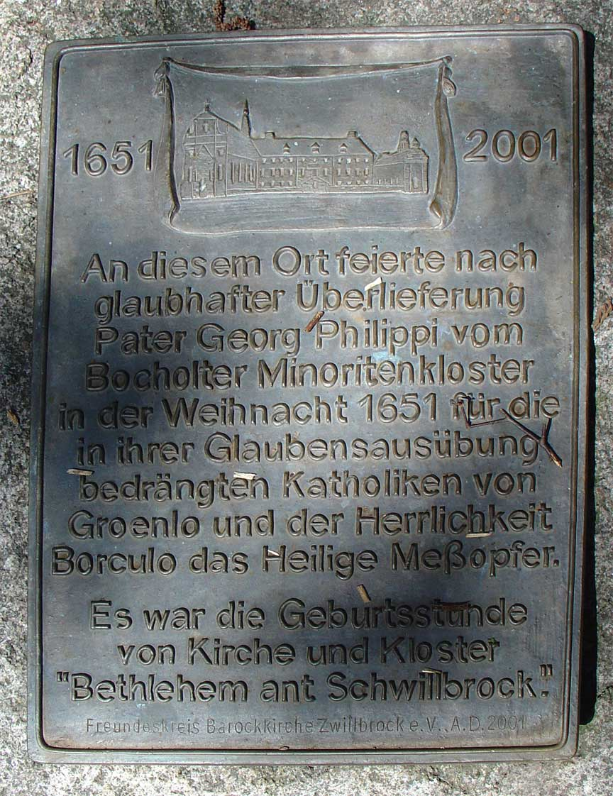 Gedenksteen nabij Zwillbrock waar volgens de overlevering in de kerstnacht van 1651 de eerste mis werd opgevoerd door de franciscaner pater Georg Philippi uit het klooster van Bochholt ten behoeve van de katholieken in Groenlo en Borculo, die verhindred werden in de protestantse Nederlanden hun geloof te beoefenen